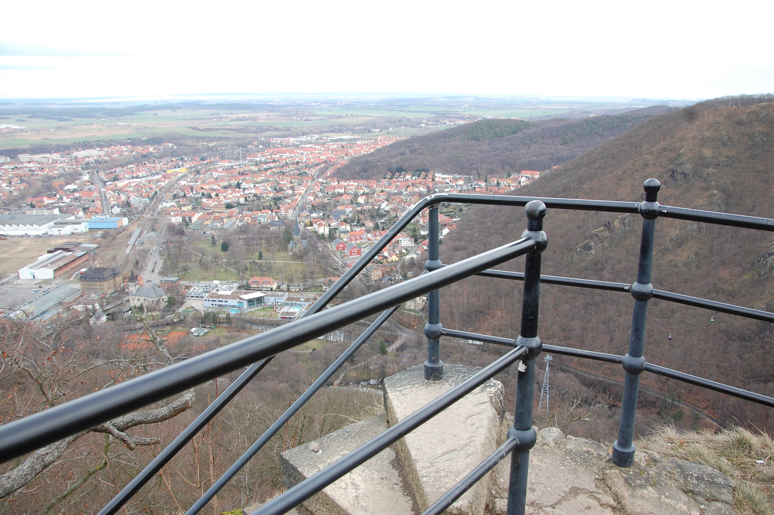 Blick von der Bülowhöhe auf Thale